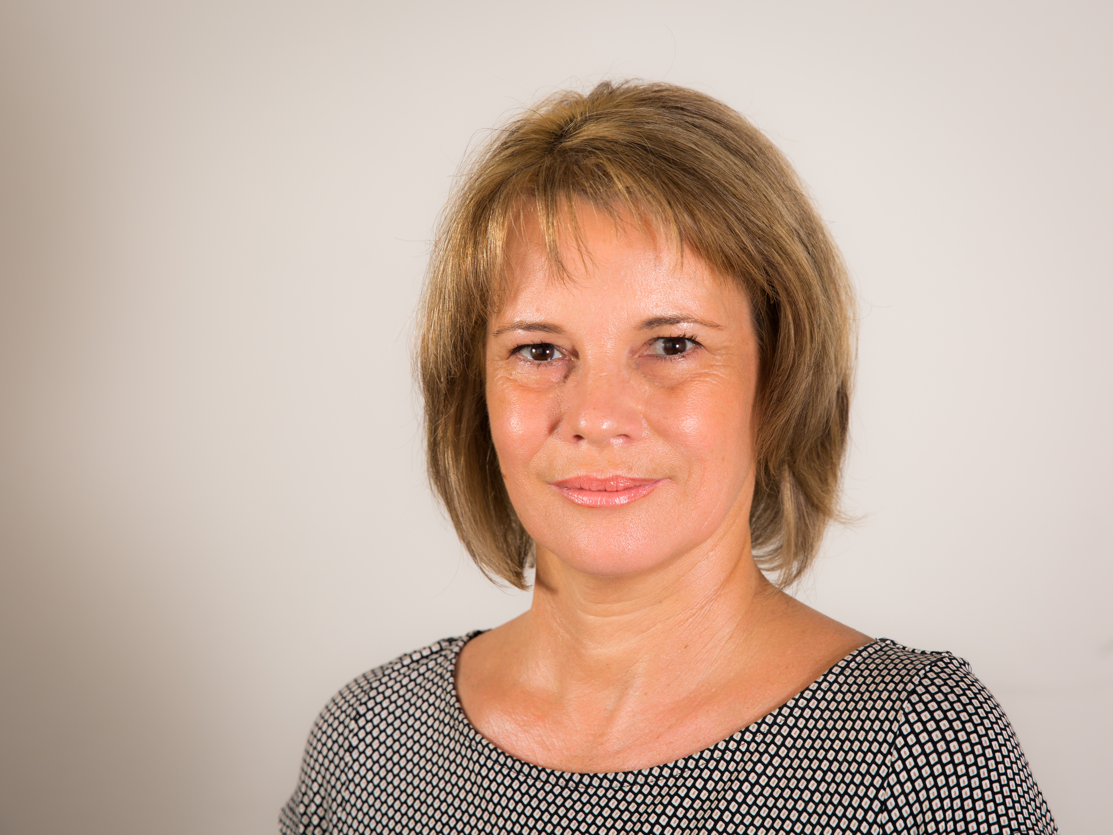 Die saarländische Landtagsabgeordnete Christiane Blatt